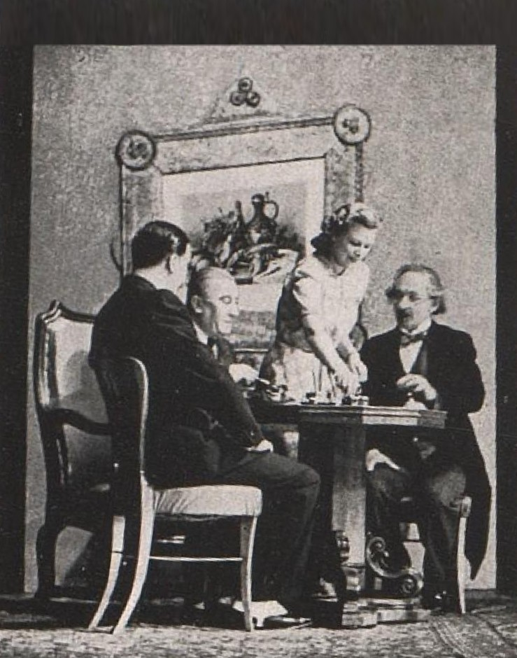 Ladislav Hammer (1904-1949), český herec.